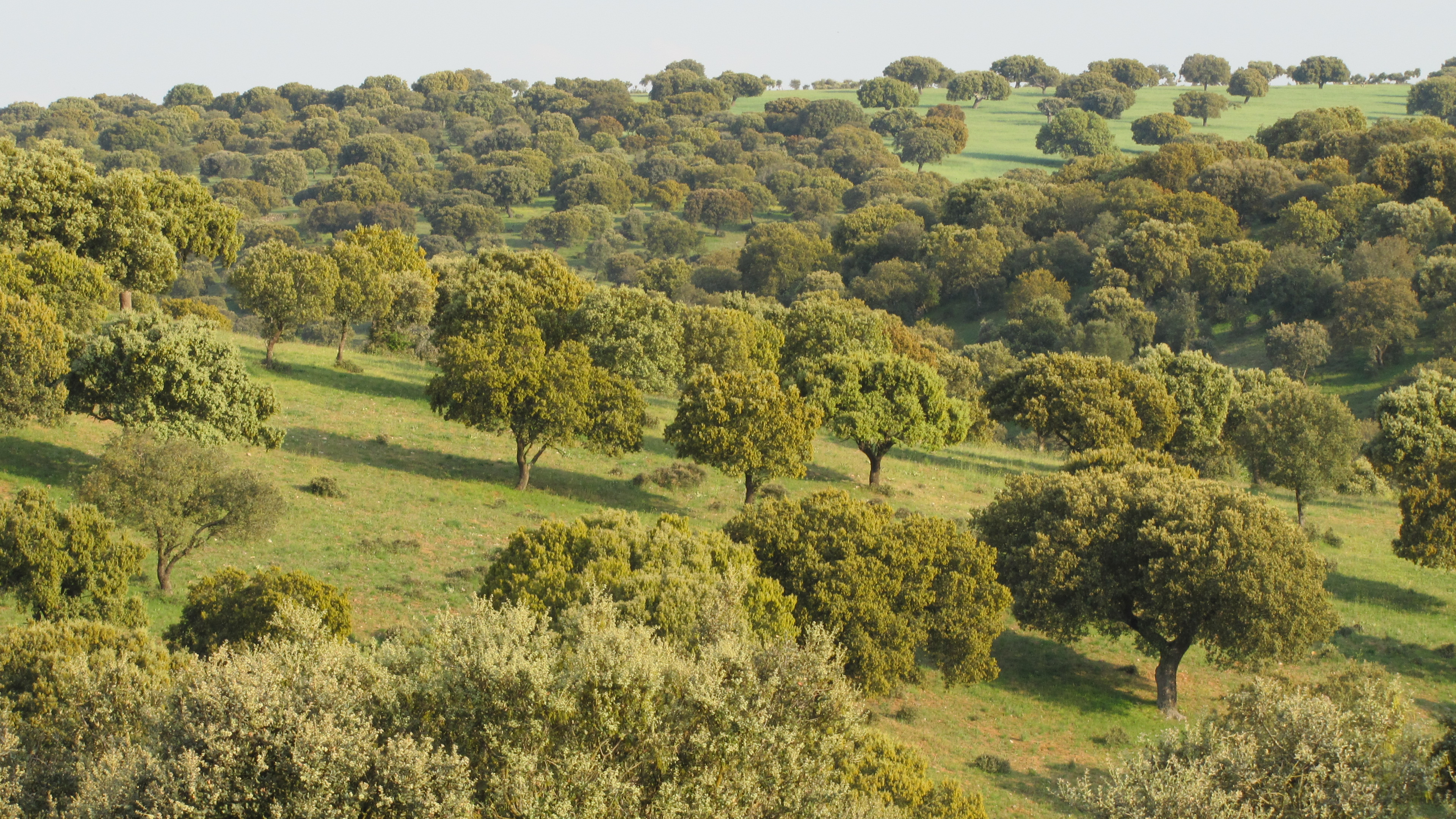 Dehesa, finca Los Valhondos, perteneciente a BEHER, Bernardo Hernández. En la fotografía se observa un bosque de encinas, dedicado a la cría de cerdos, para la producción de jamón de bellota. Situada en el municipio de Pelayos (Salamanca), cercano a la localidad de Guijuelo.